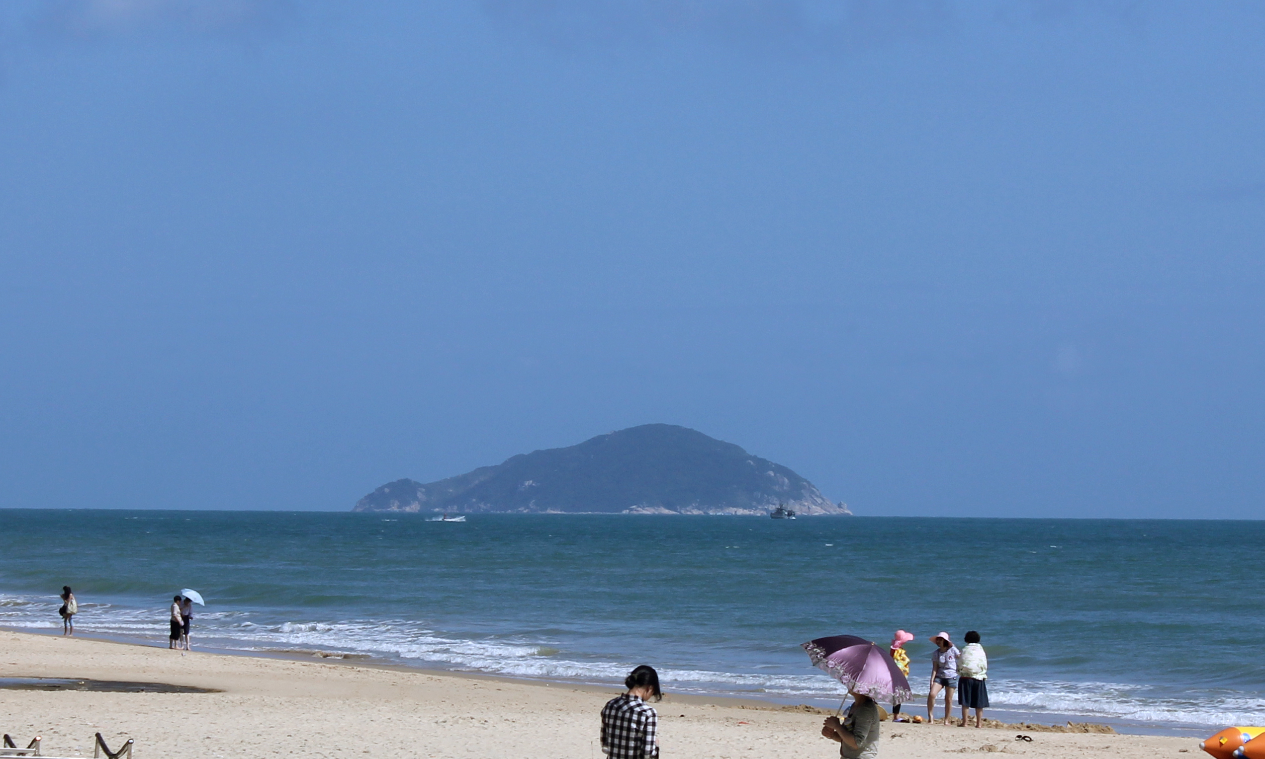 海南省万宁市洲仔岛，拍摄于石梅湾。